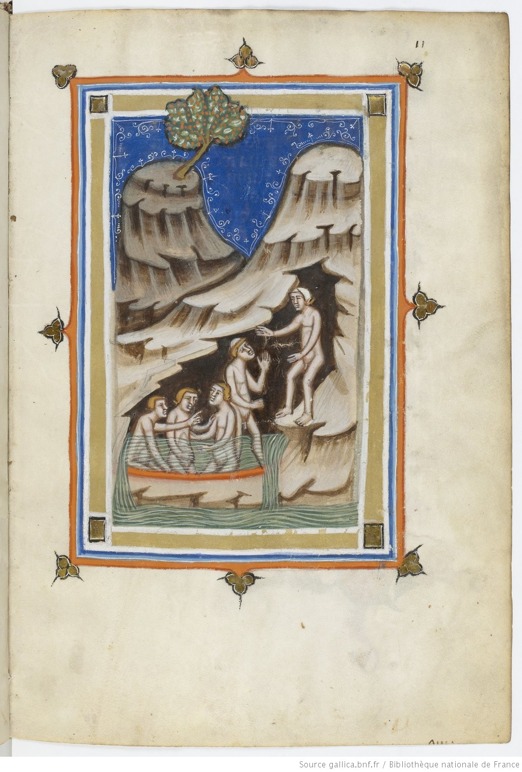 Miniature d'une copie du XIVe siècle du manuscrit de Pierre d'Éboli, « De balneis puteolanis » (BnF, Latin 8161, f°11r).